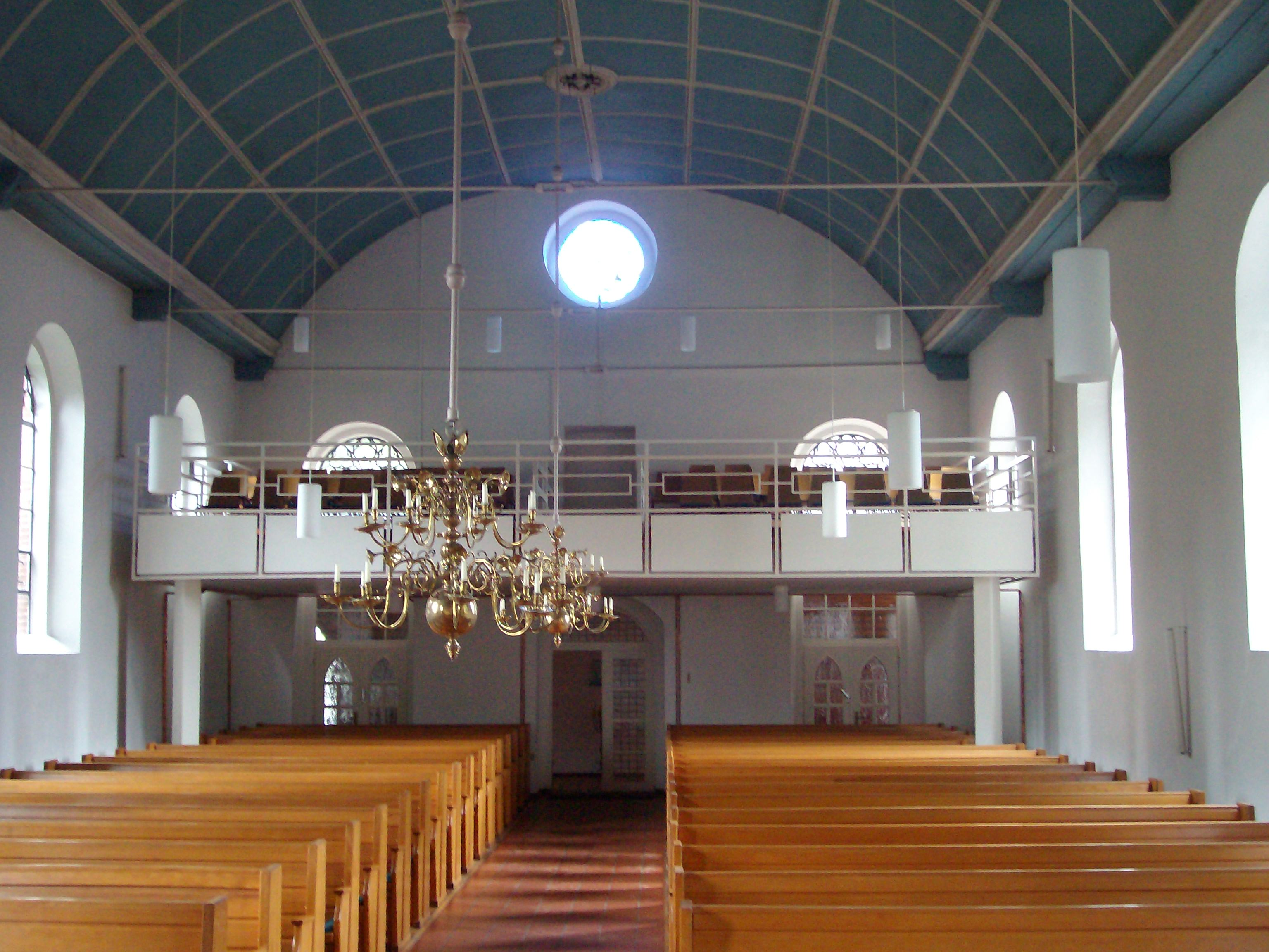 Innenraum Reformierte Kirche in Neermoor